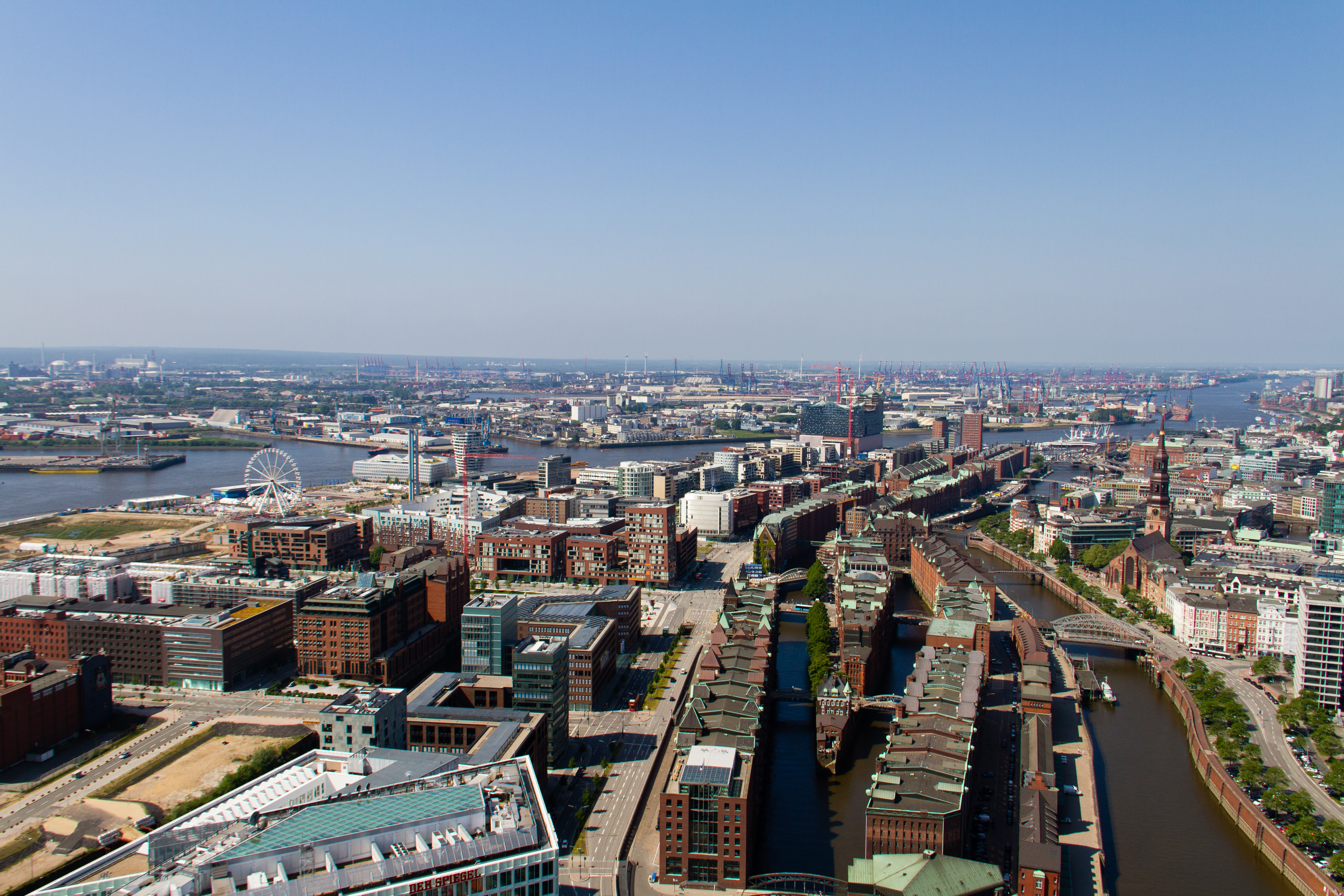 Aufnahme während des Projekts Heißluftballon